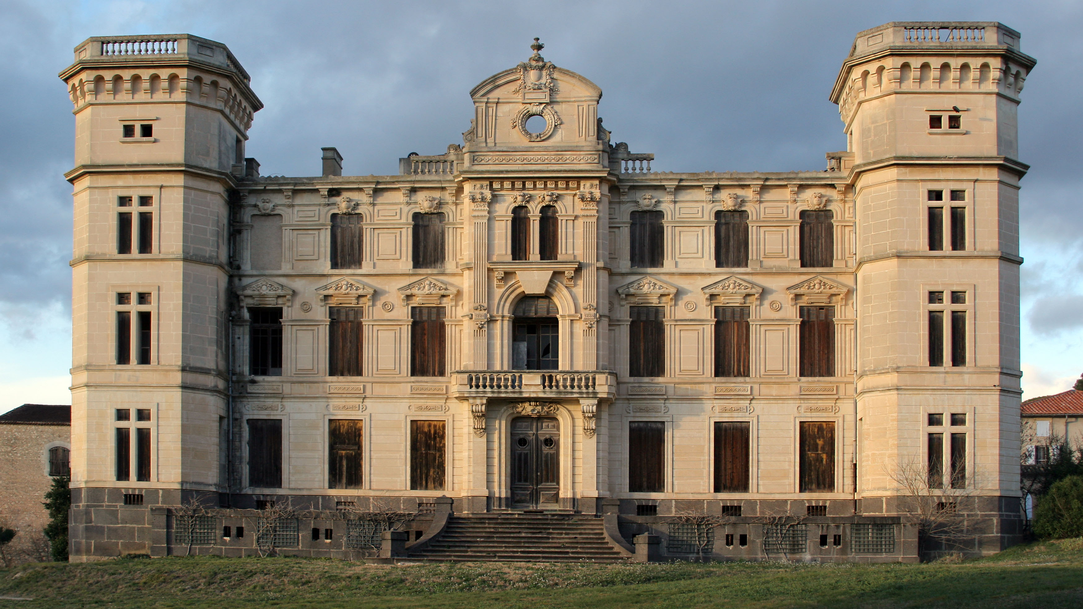 Façade sud